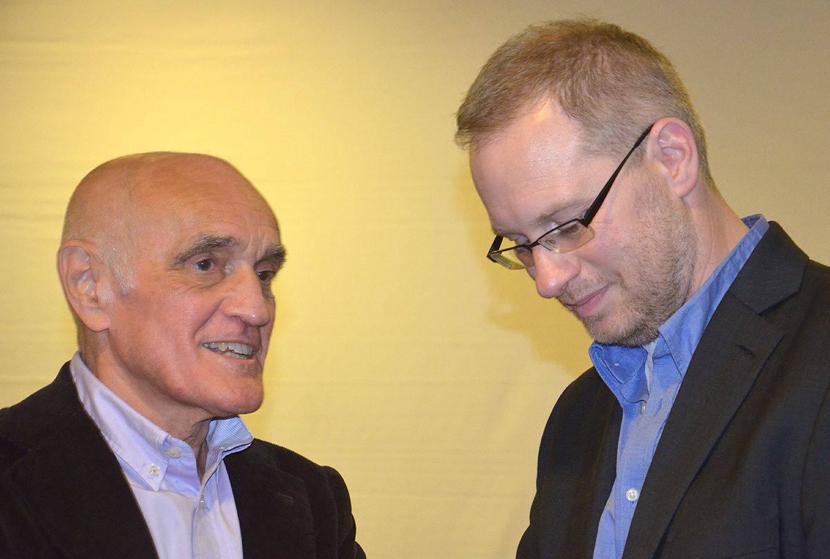 Im Gespräch: Martin Kind, Präsident des Sportvereins Hannover 96, und der Redakteur der Hannoverschen Allgemeinen Zeitung, Simon Benne, hier während der 350-Jahr-Feier der Gottfried Wilhelm Leibniz Bibliothek – Niedersächsische Landesbibliothek und der Verabschiedung des Bibliotheksdirektors Dr. Georg Ruppelt in den (Un-)Ruhestand ...